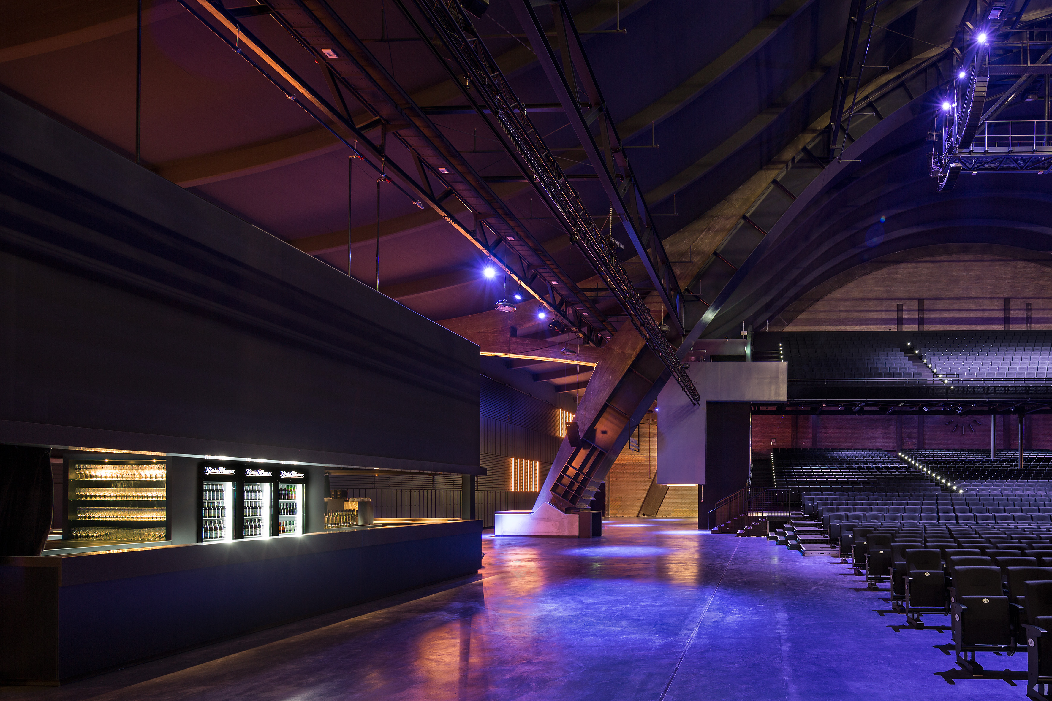 Mehr! Theater am Großmarkt, Seitenfoyers